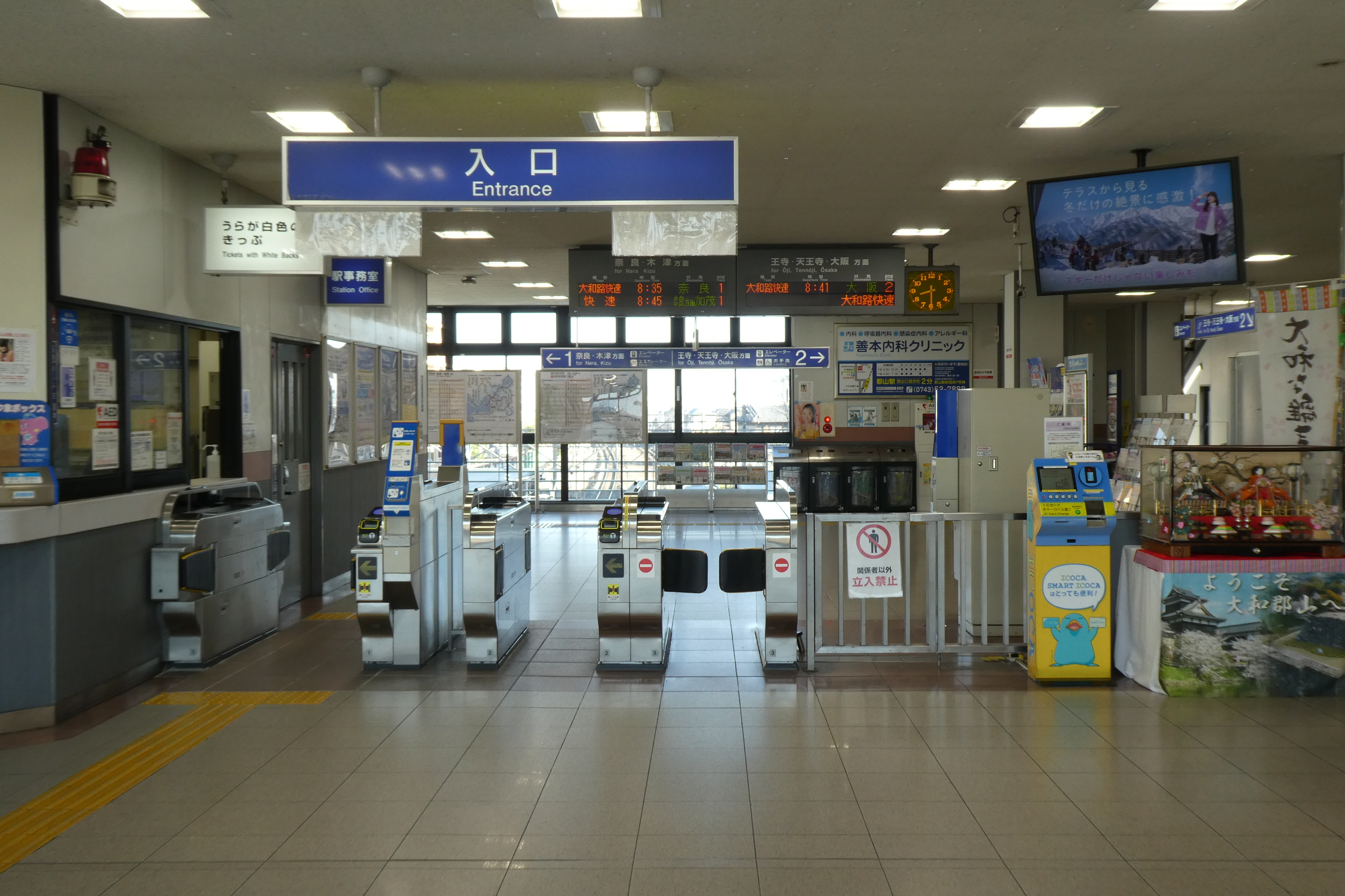 関西本線（大和路線）郡山駅改札